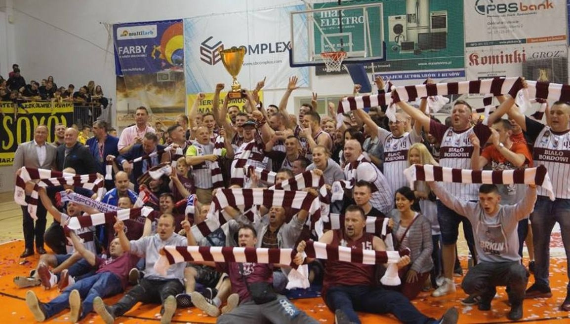 Finał. Spójnia z pucharem i kibicami (17.05.2018)